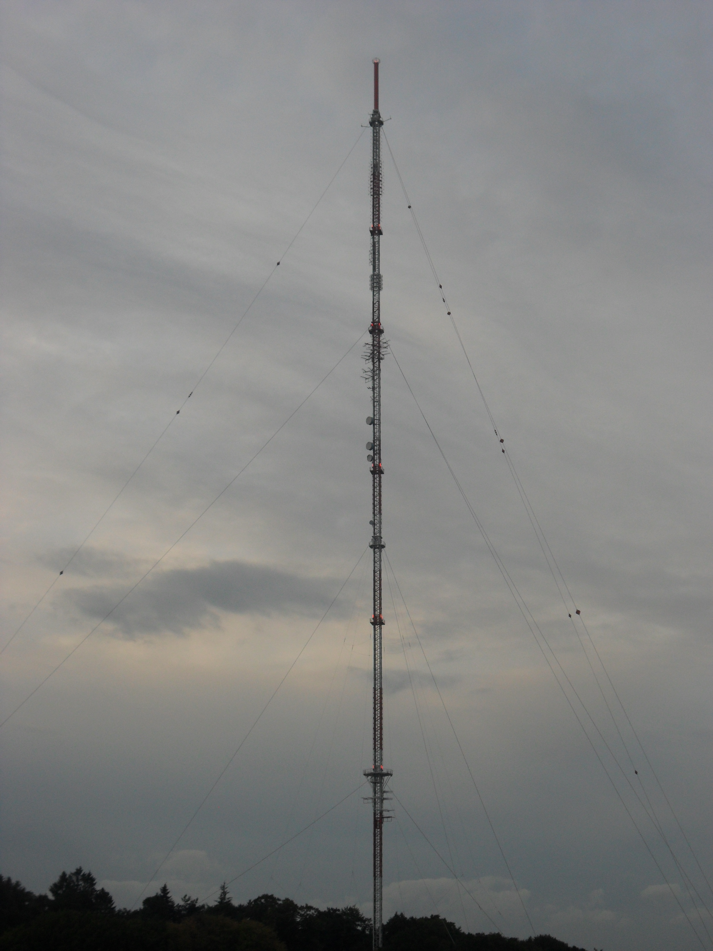 Erster, 301 Meter hoher Sendemast auf dem Hordtberg in Velbert-Langenberg